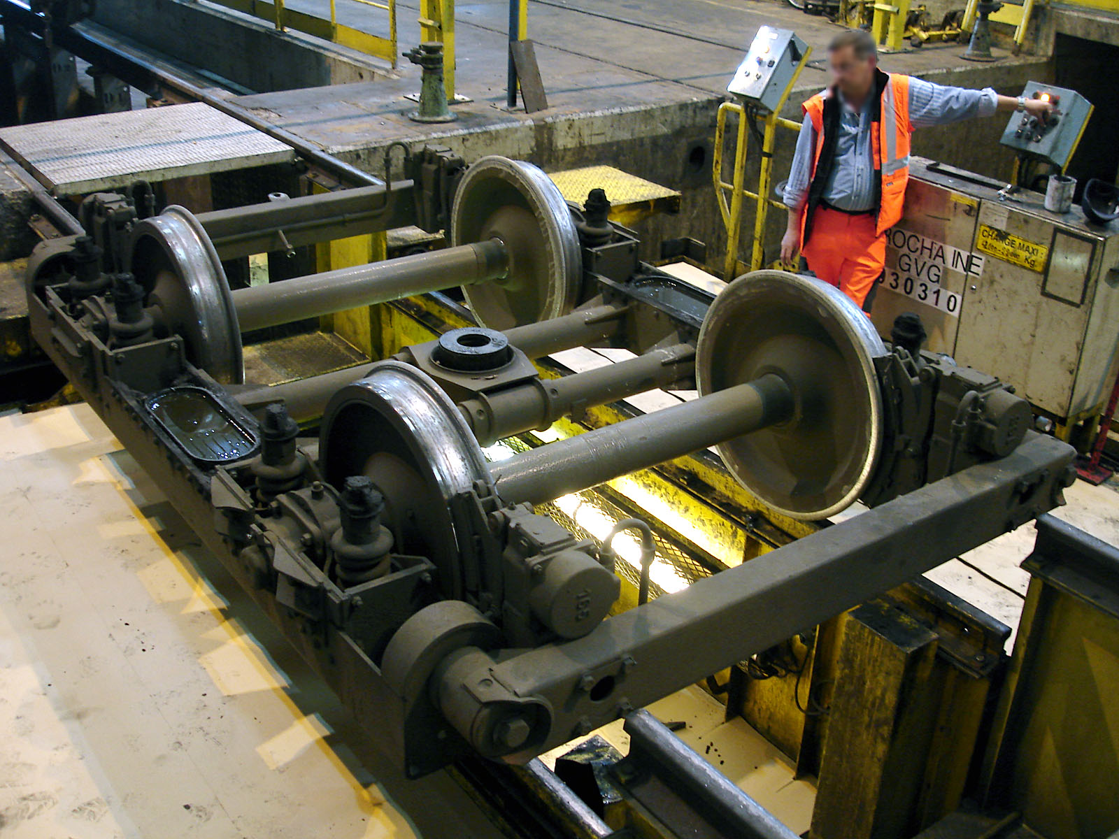 Dépose d'un bogie d'une rame inox de banlieue au technicentre Paris Nord-Joncherolles, Villetaneuse, Seine-Saint-Denis, France.